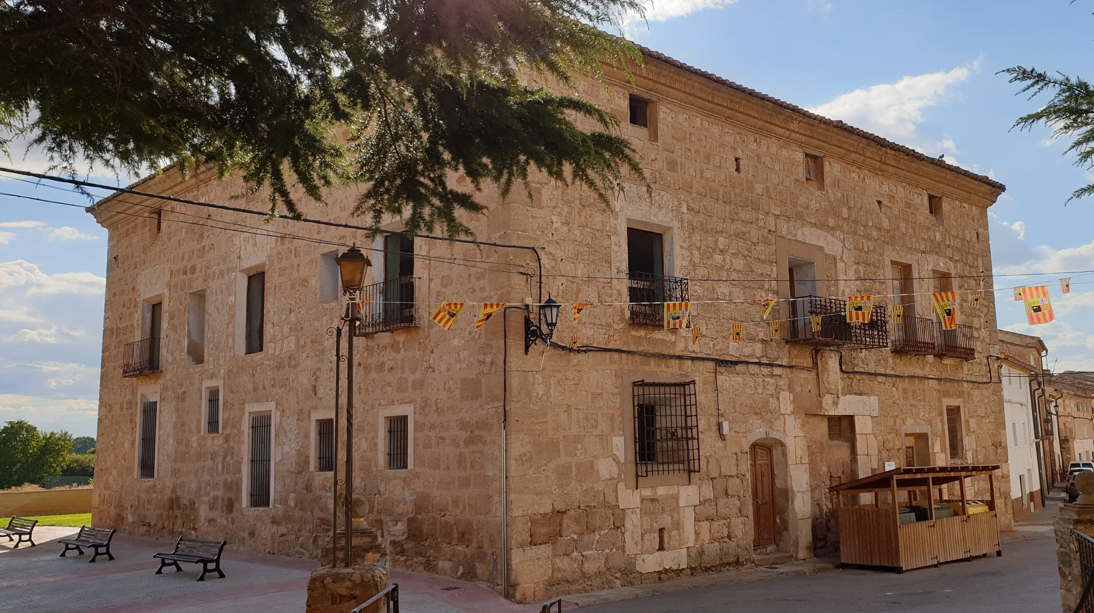 Casa solariega de Fuentes Claras (Teruel, Aragón, España)